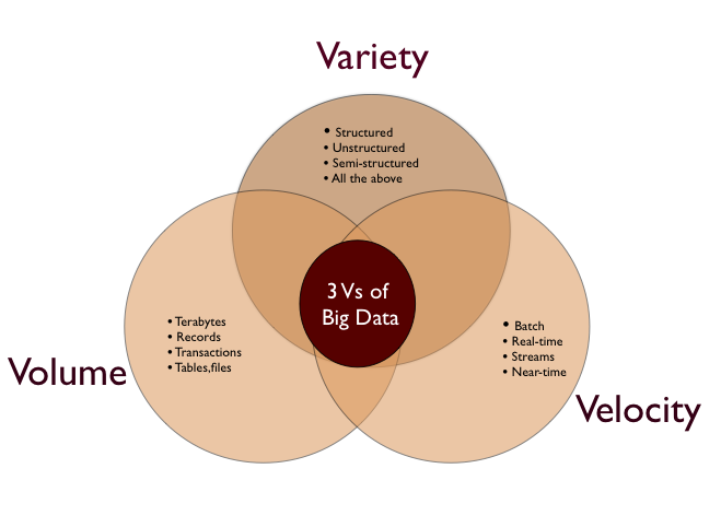 خصائص البيانات الضخمه